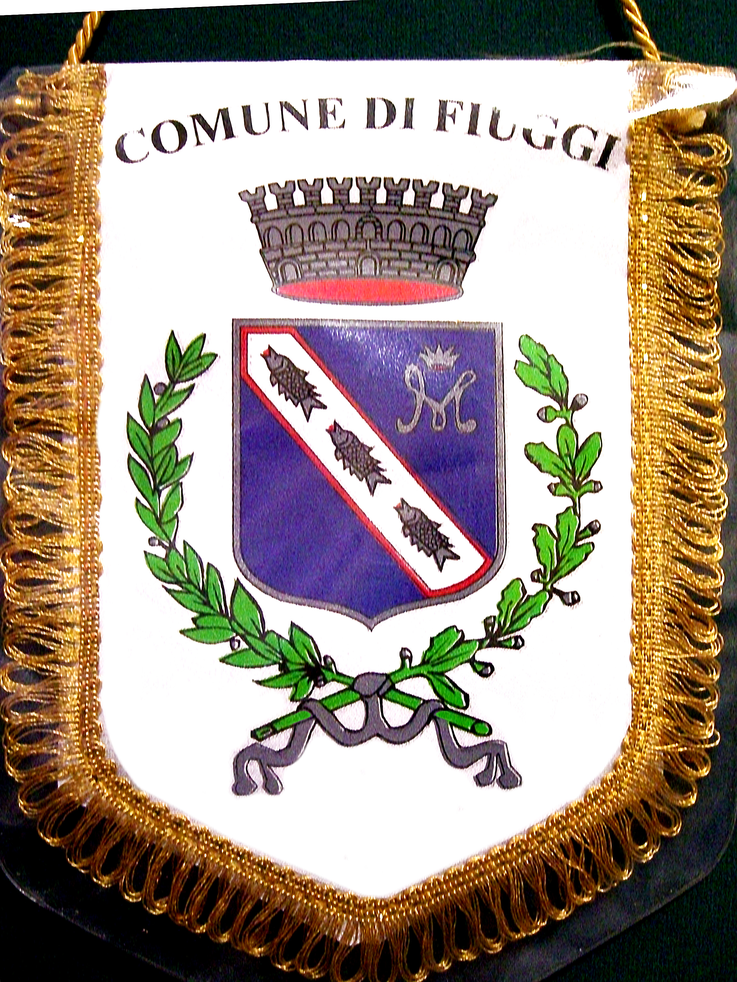 coat of arms of fiuggi (Arbeitsversion)